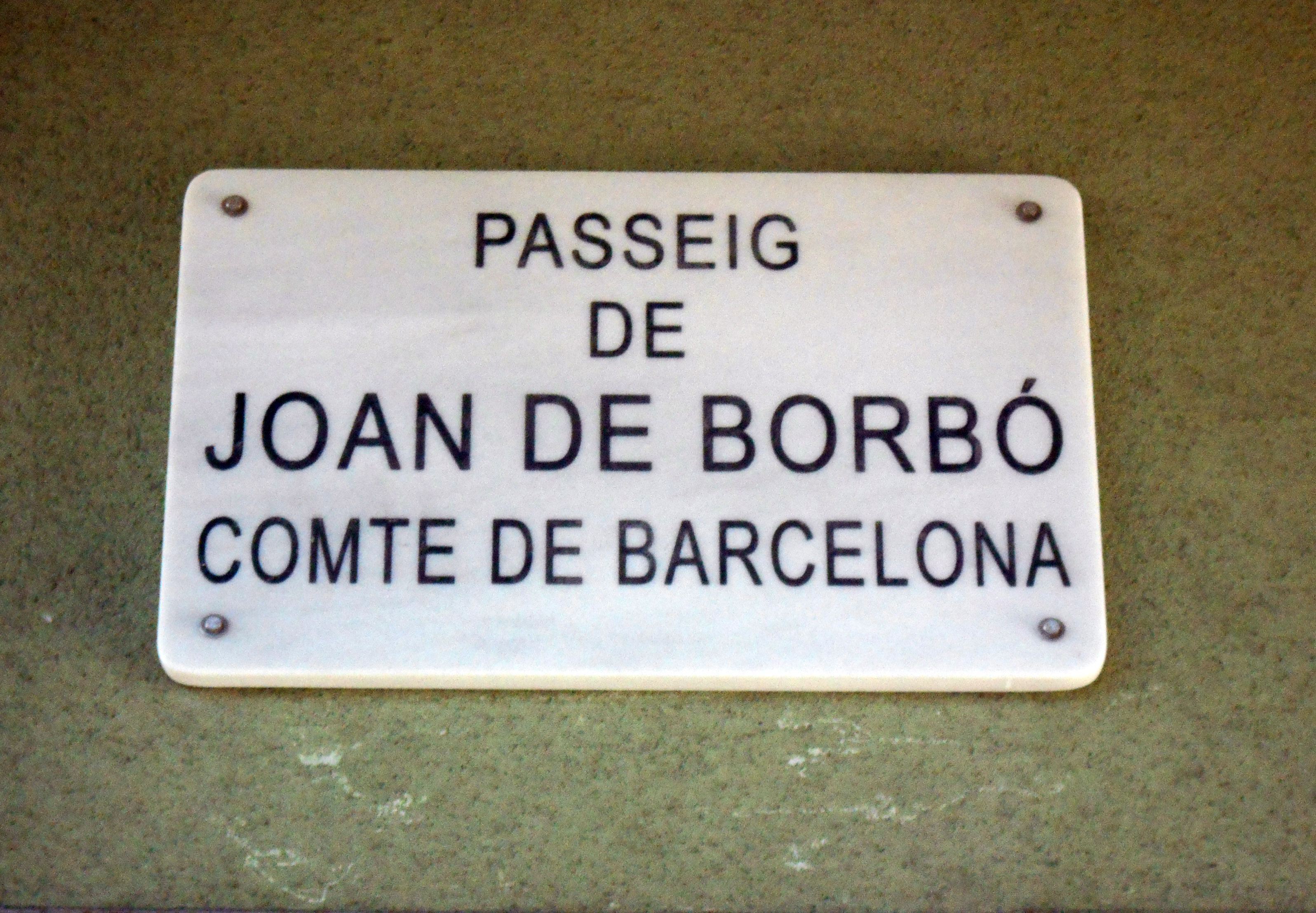 Paseo de Juan de Borbón Conde de Barcelona.